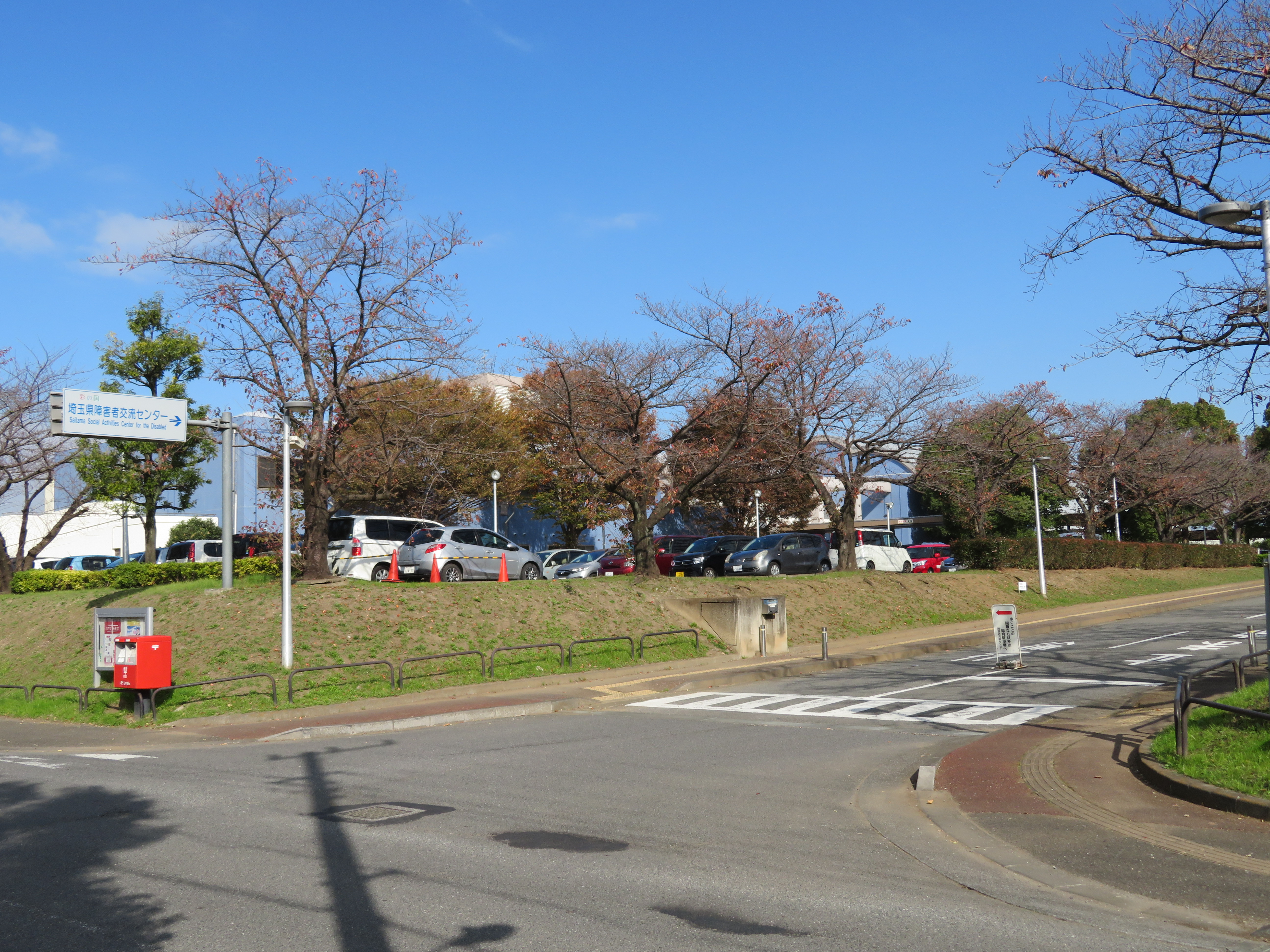 さいたま市浦和区にある埼玉県障害者交流センター Canon PowerShot SX720 HS